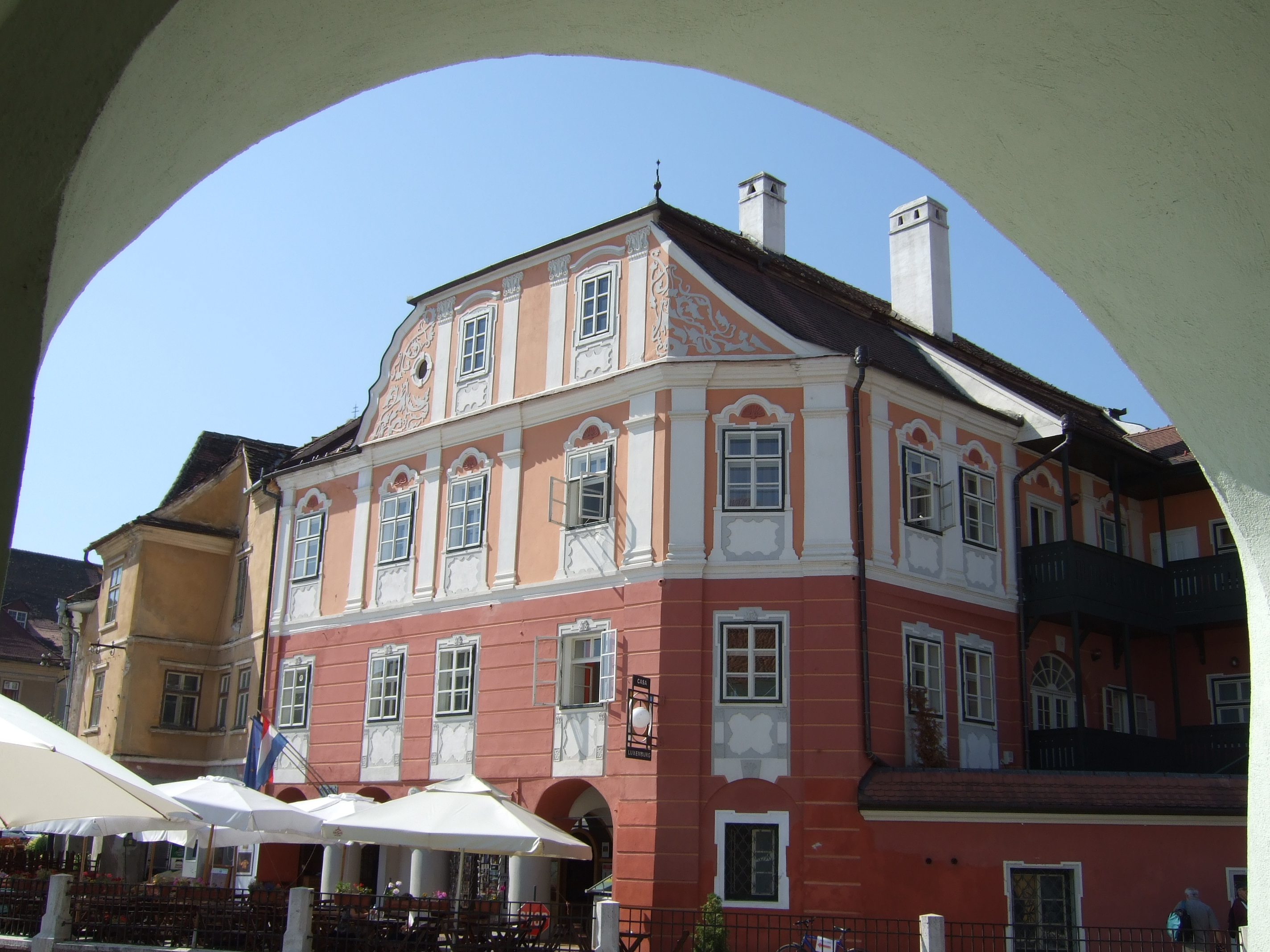 la Maison du Luxembourg, Piata Mica